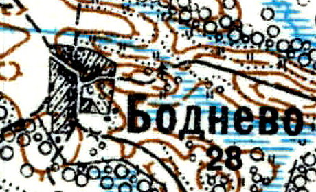 Топографическая карта Ленинградской области, квадрат Vc-29 (Батецкая), деревня Боднево